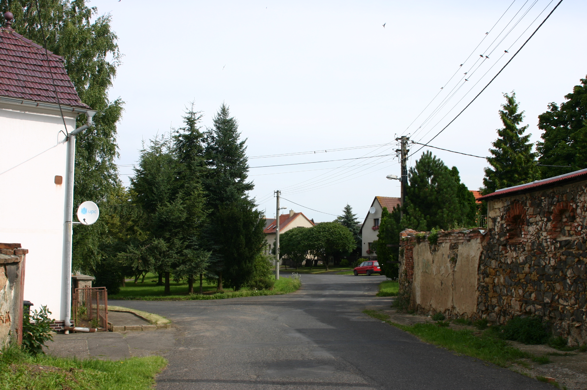 Osada Dobrčice v okrese Most (náves)